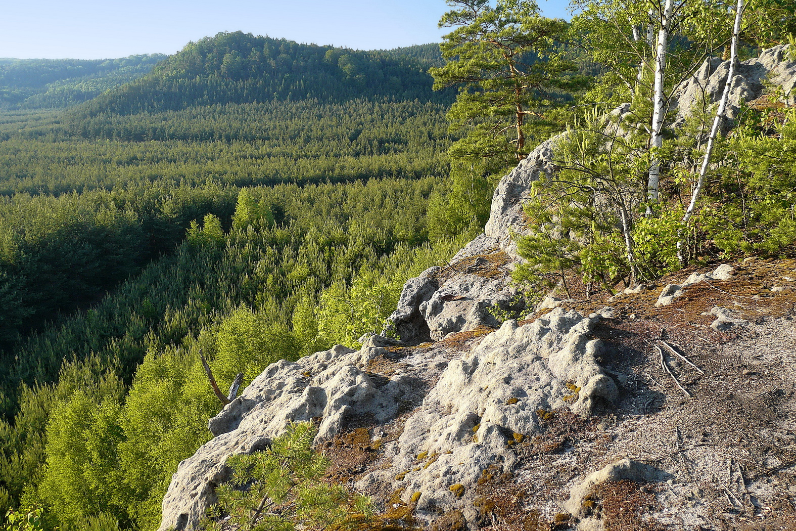 Pískovcové skály na Havířském vrchu, vzadu Malý Borný